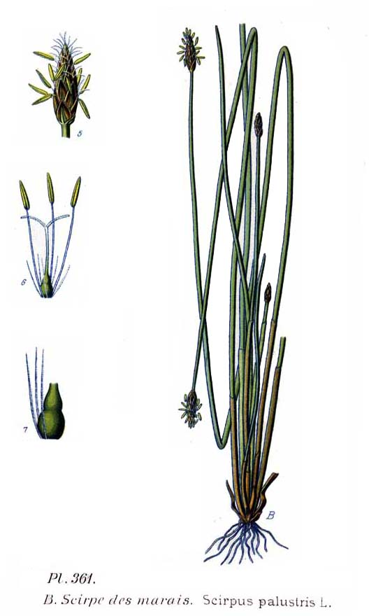 Eleocharis palustris subsp. palustris, syn. Scirpus palustris L.